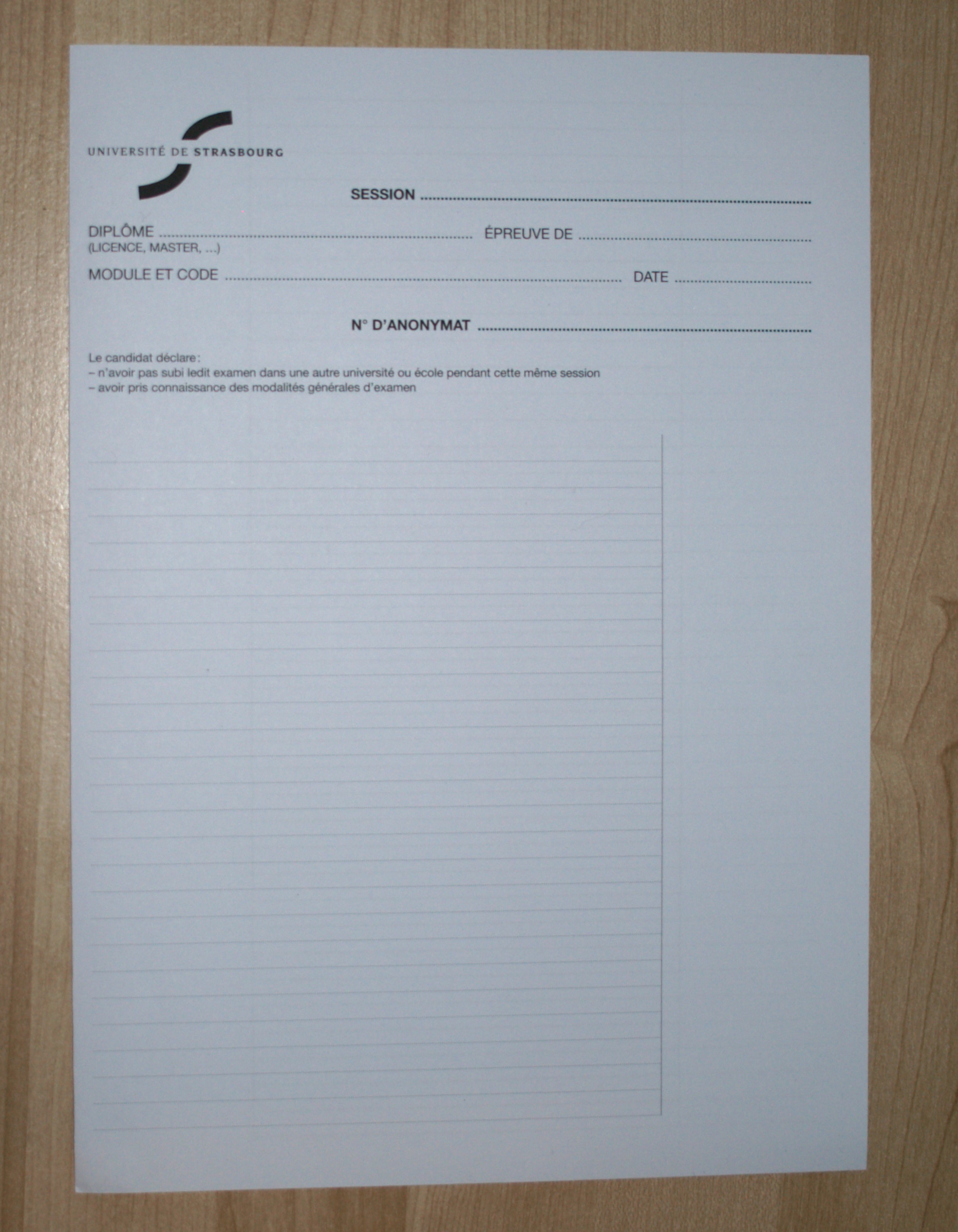 Une feuille d'examen de l'Université de Strasbourg